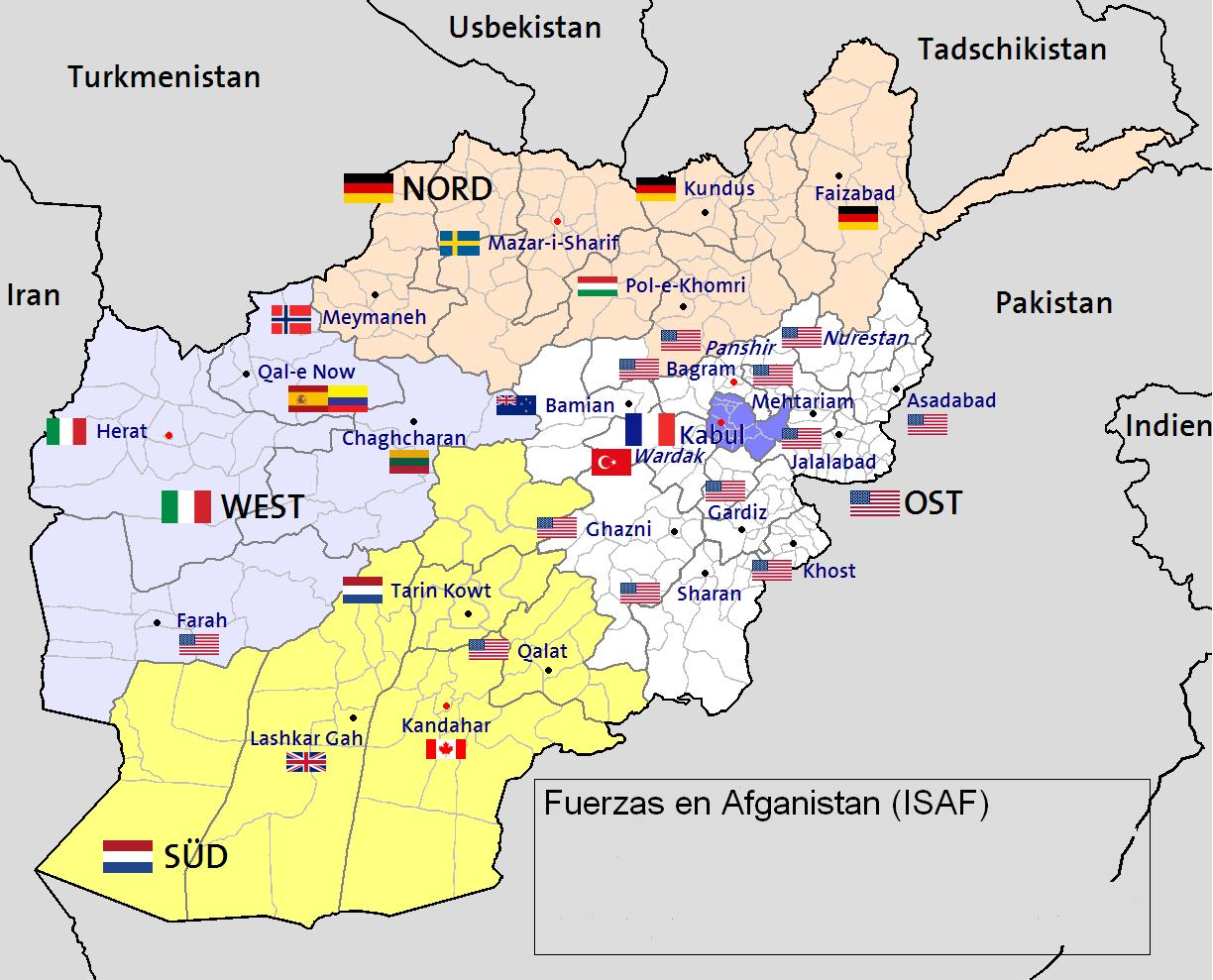 fuerzas de la (ISAF) en Afganistan.